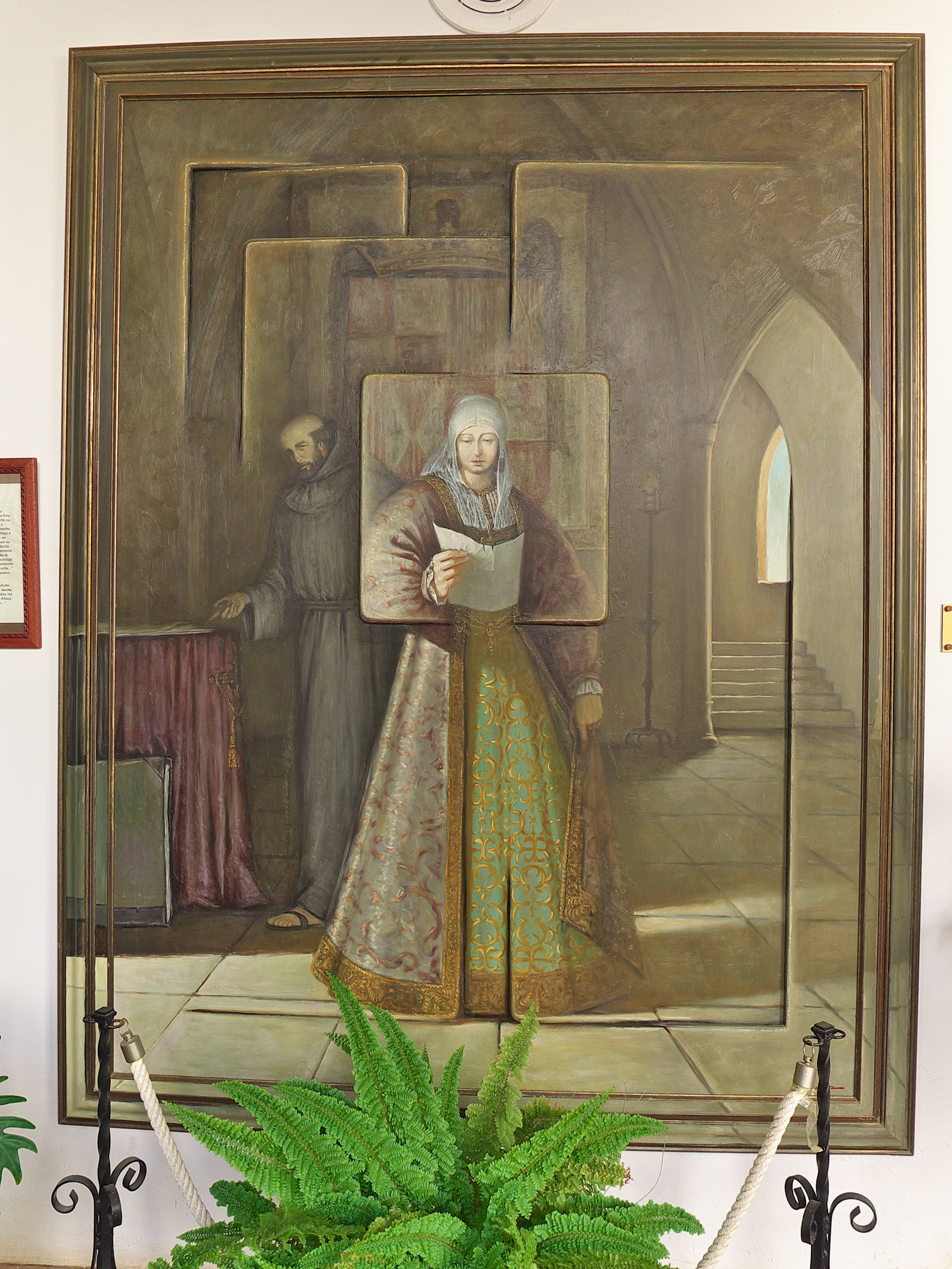 Claustro de la Hospedería. La reina Isabel envía un escrito a fray Juan Pérez (Juan Peres) solicitándole, urgentemente, se desplace a Santa Fé para tratar el asunto Colón. La pintura, componente de la colección Los Protagonistas del Descubrimiento, es obra de Juan Manuel Núñez Báñez, natural de la Palma del Condado (Huelva)